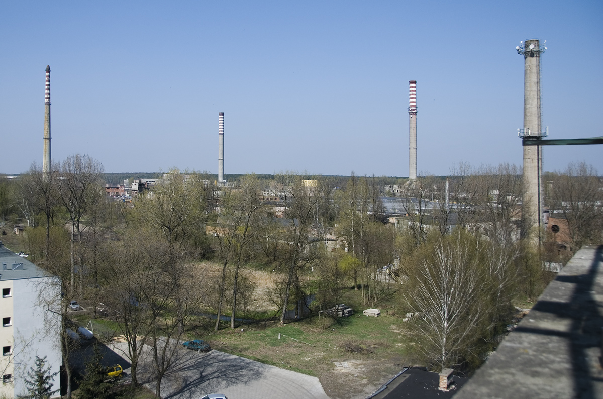 Kominy Wistomu 2009